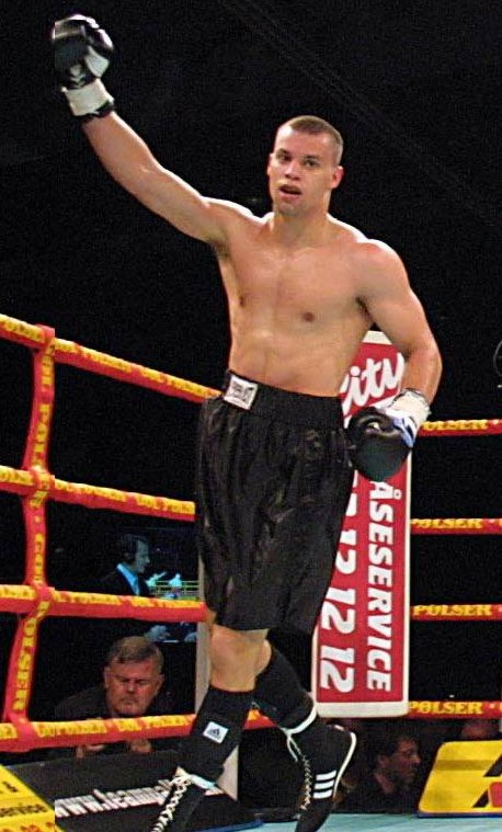 Vinnare på knock out